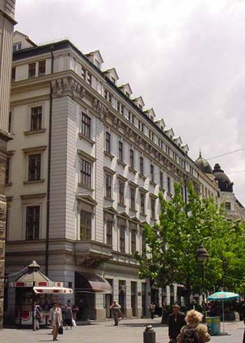 Филолошки факултет из Кнез Михајлове.